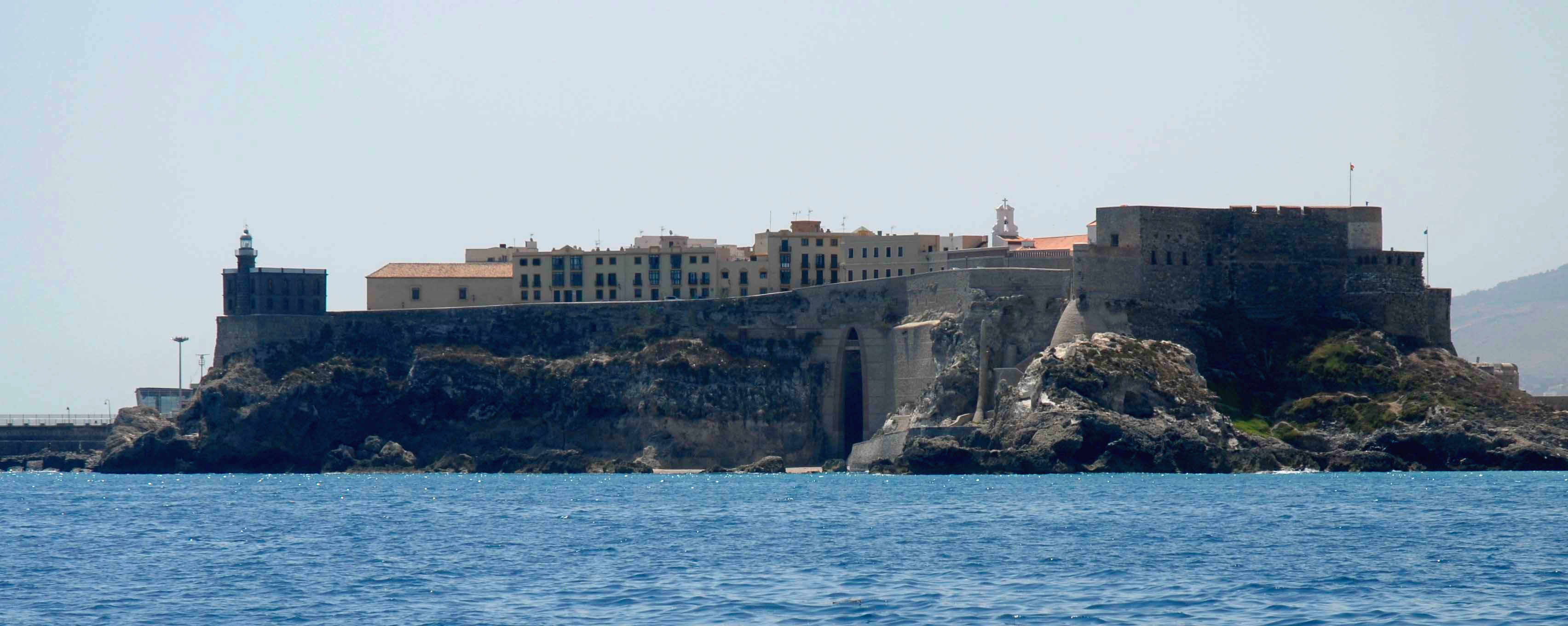 Vista del primer recinto fortificado de Melilla desde el mar (frente de Trápana)